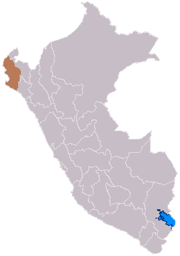 Mapa de la cultura Tallán